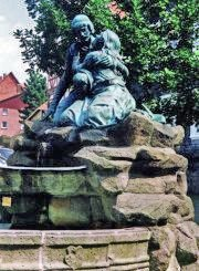 Liebenbachdenkmal Spangenberg